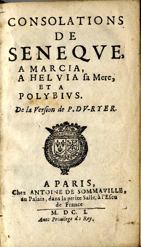 Consolations de Sénèque à Marcia, Helvia et à Polybius par Pierre Du Ryer